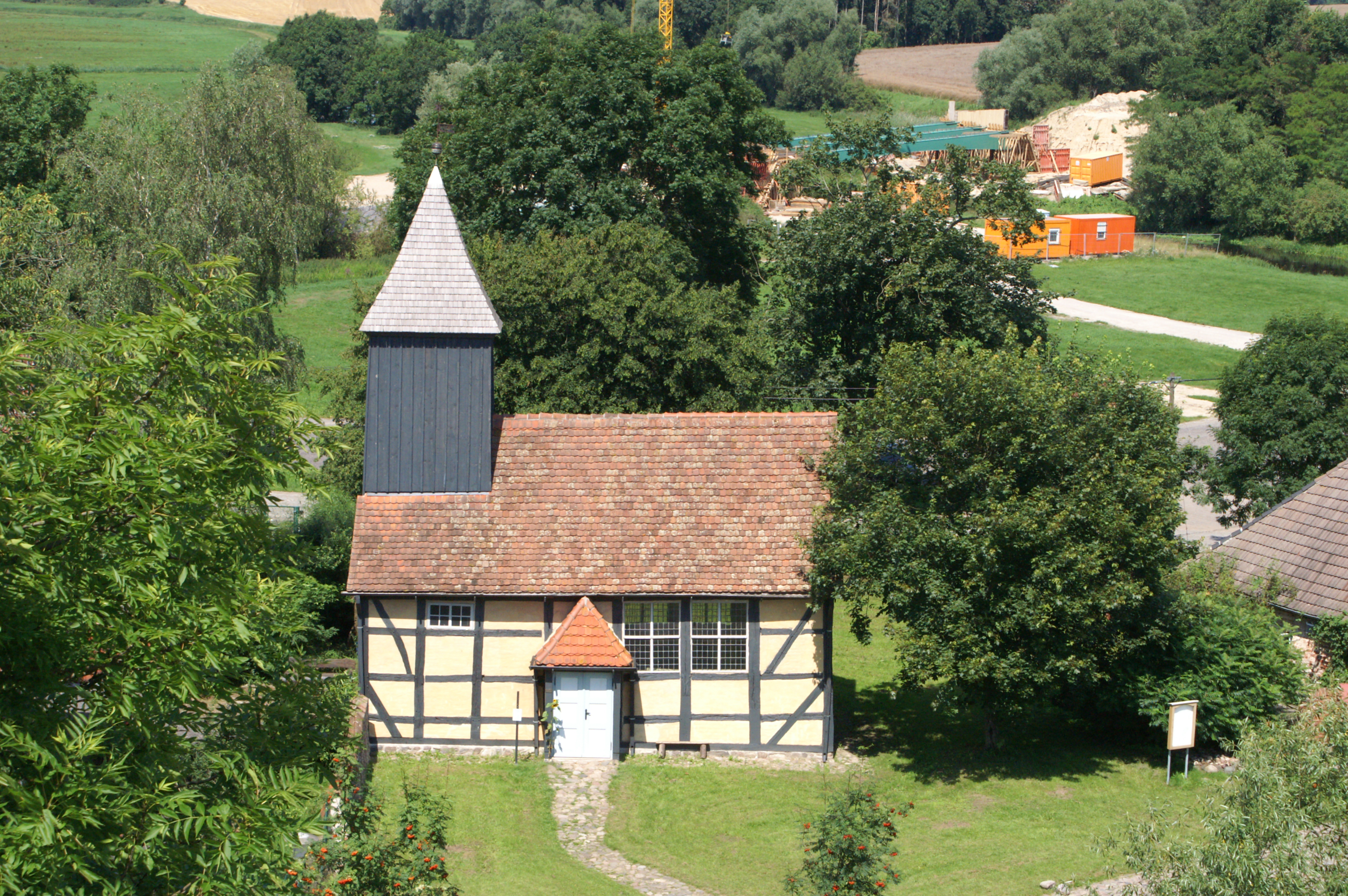 Kirche Klempenow, Südseite, vom Turm der Burg Klempenow aus gesehen